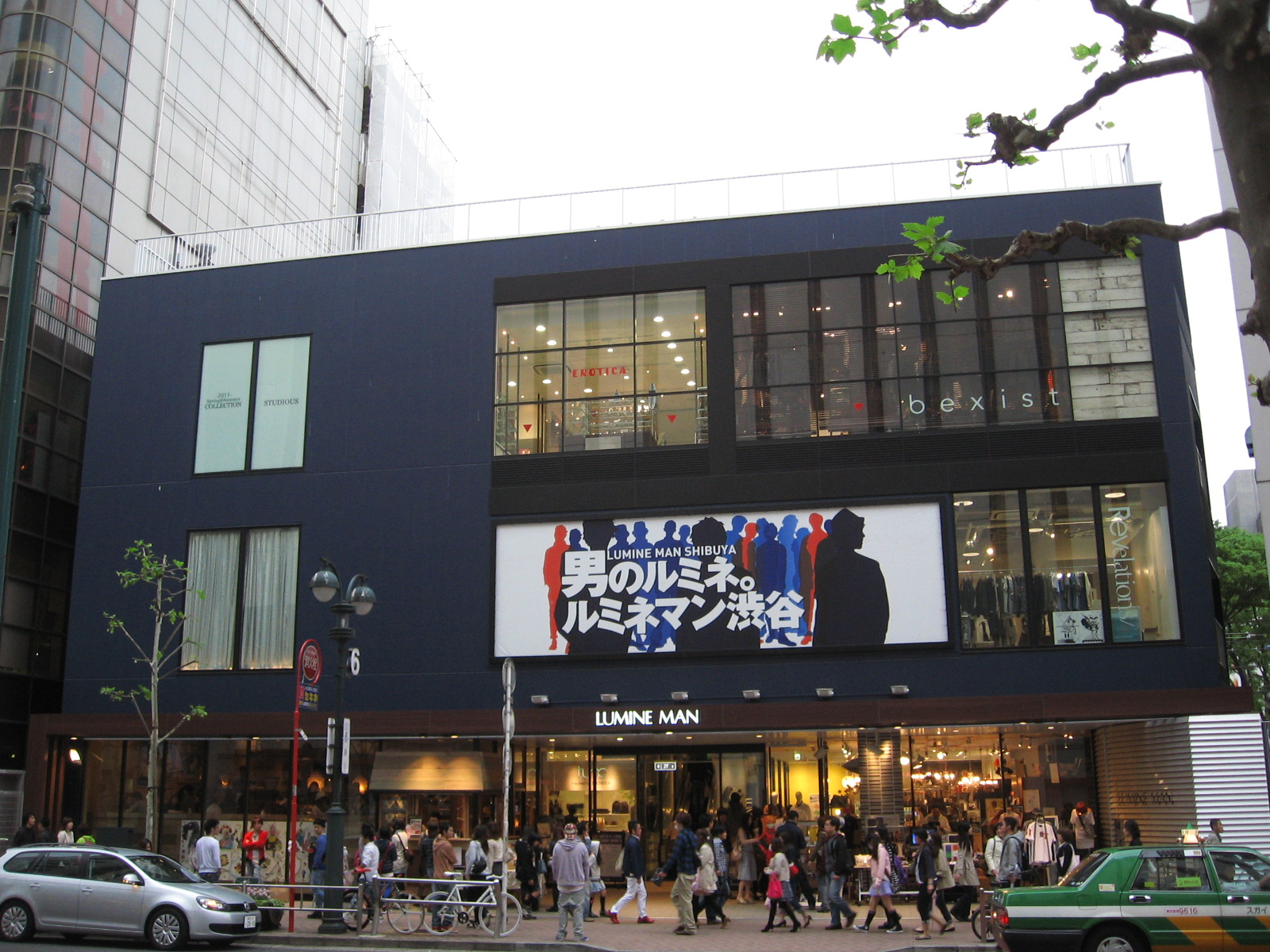 LUMINE MAN SHIUBUYA at Shibuya, Tokyo.